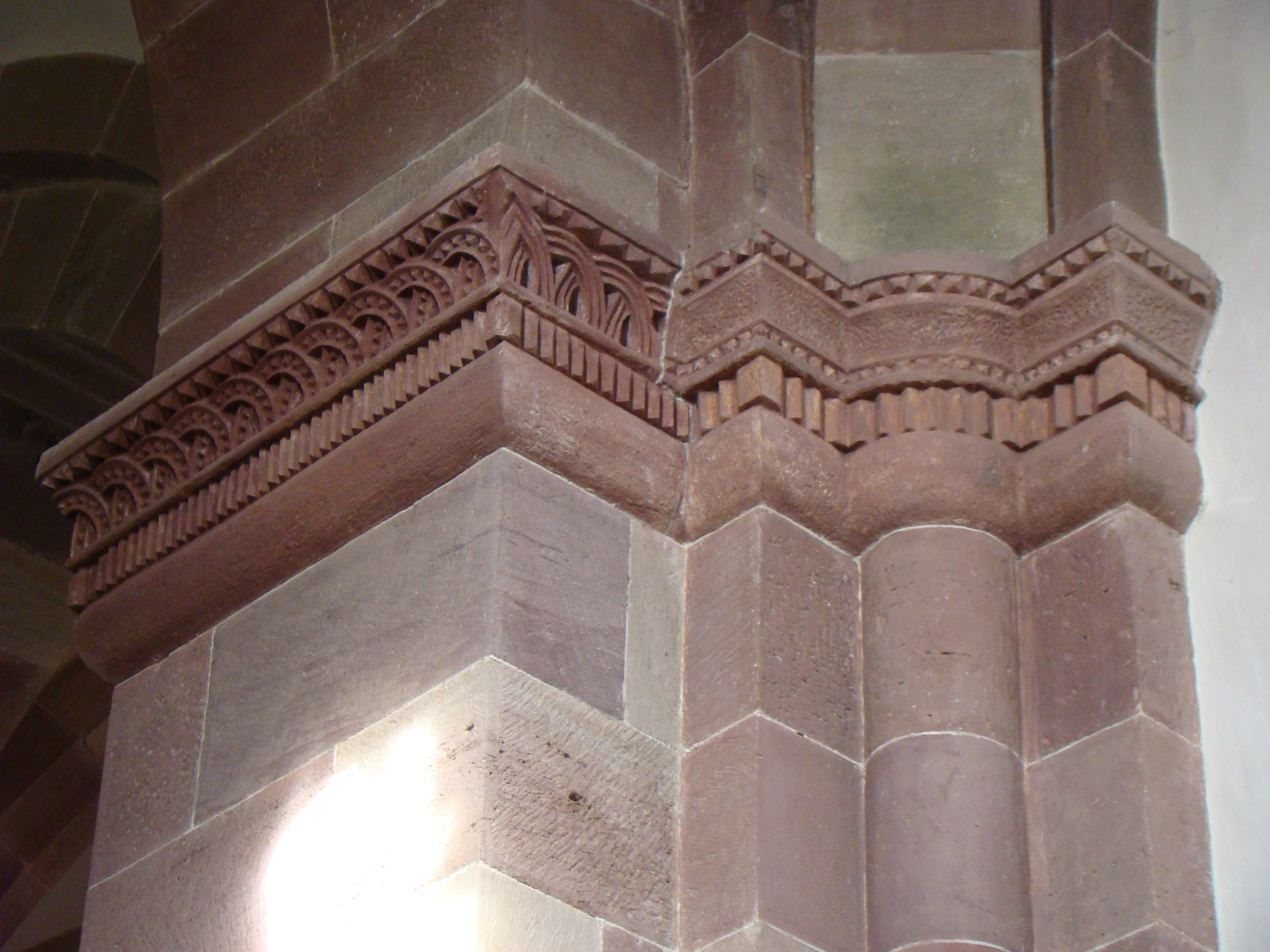 Klosterkirche Lobenfeld